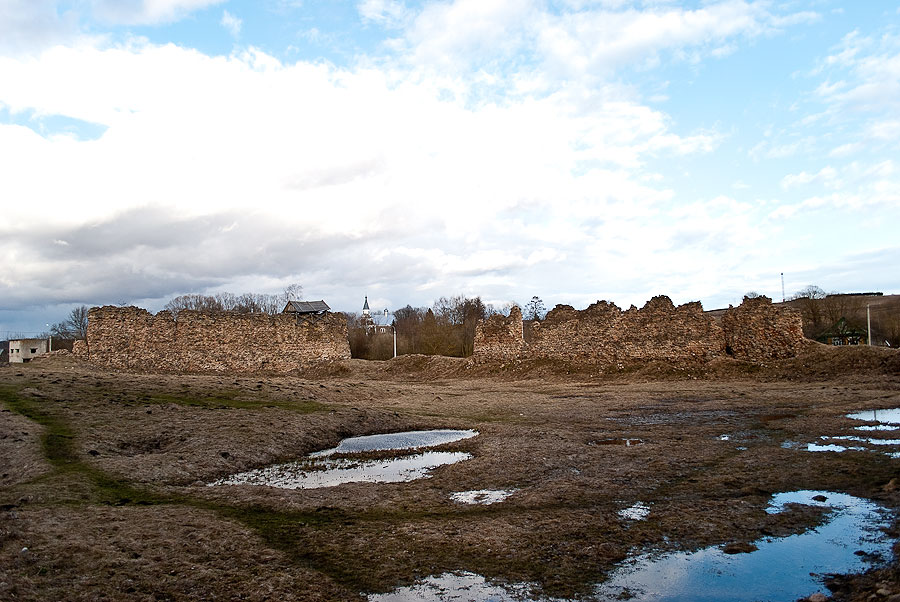 Беларуская (тарашкевіца): Фрагмэнты замку. в. Крэва This is a photo of Belarusian heritage monument. Reference number: 412Г000602 ( WLM)